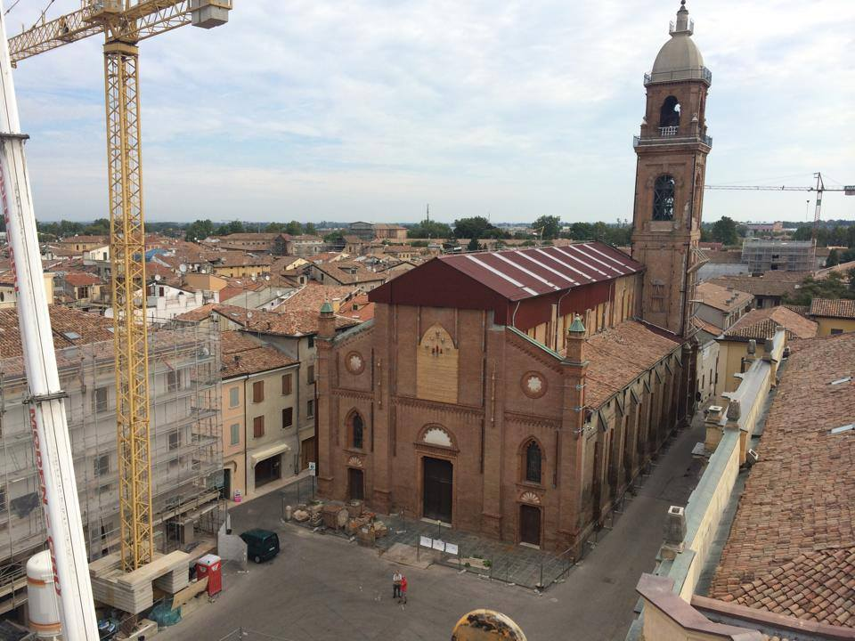 Duomo di Mirandola, cantiere in corso d'opera Presentazione dei lavori di restauro e miglioramento sismico a seguito degli eventi del 20 e del 29 Maggio 2012 e visite guidate al cantiere della Chiesa di S. Maria Maggiore (ore 10.30, 11 e 11.30 su prenotazione) A poco più di sei anni dal tragico sisma che ha colpito l'Emilia-Romagna nel maggio 2012 viene aperto al pubblico in via straordinaria il cantiere di restauro e miglioramento sismico della Chiesa di S. Maria Maggiore di Mirandola, il Duomo della città, che ha subito gravi crolli nella navata centrale, nella navata laterale sinistra e di parte della copertura dell’abside. Alle ore 10, apertura dell'iniziativa con i saluti istituzionali. A seguire, alle ore 10.30, 11 e 11.30 (prenotazione obbligatoria per max 10-15 persona a visita) si terranno tre visite guidate al cantiere a cura del progettista, della direzione lavori, del R.U.P della Diocesi di Carpi e delle funzionarie della Soprintendenza competenti per il territorio di Mirandola: l'Arch. Emanuela Storchi (che segue come alta sorveglianza l’esecuzione dei lavori) e la storica dell'arte Elena Marconi. Le visite guidate illustreranno lo stato di avanzamento dei lavori, il progetto di ricostruzione e completamento delle parti crollate e la restituzione alla cittadinanza del monumento consolidato e restaurato in collaborazione con la Diocesi di Carpi e la Parrocchia di S. Maria Maggiore di Mirandola. Una proposta della Soprintendenza Archeologia, belle arti e paesaggio di Bologna in occasione delle Giornate Europee del Patrimonio che punta al più ampio coinvolgimento della cittadinanza e alla divulgazione tecnica e scientifica della storia del Duomo.